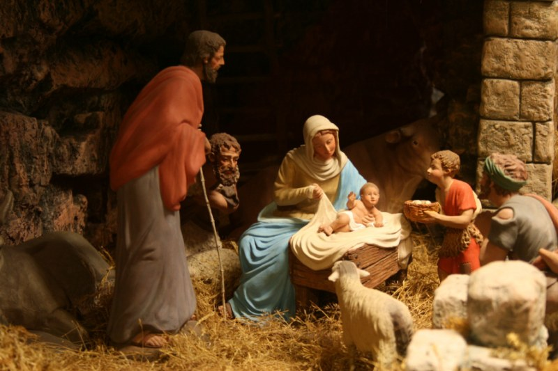 Spanische Landschaftskrippe